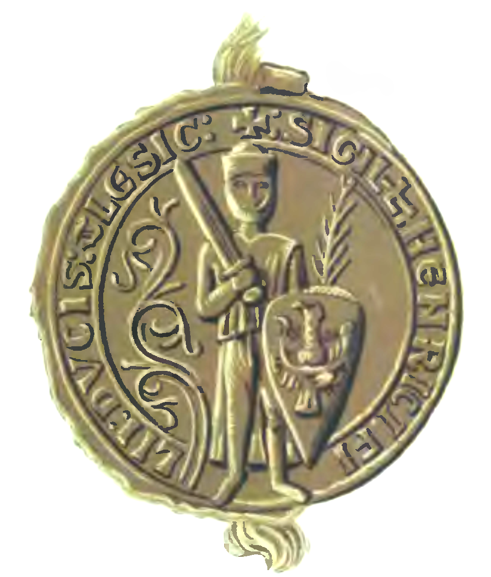 Henryk II Pobożny